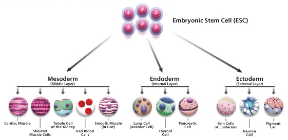 Figure 2. Résultats de différenciation de cellules souches en une des trois différentes catégories de cellules qui se sous-divisent en types de cellules spécifiques avec des rôles précis7.